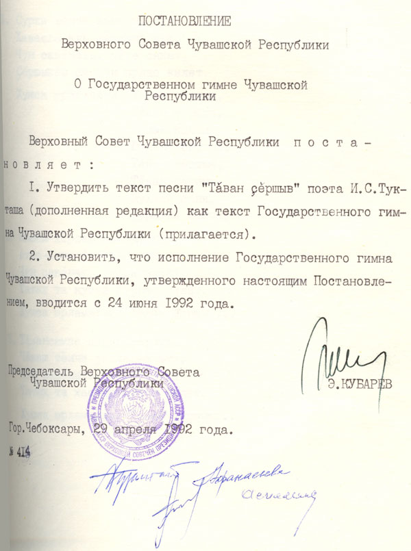 Постановление Верховного Совета Чувашской Республики о Государственном гимне Чувашской Республики